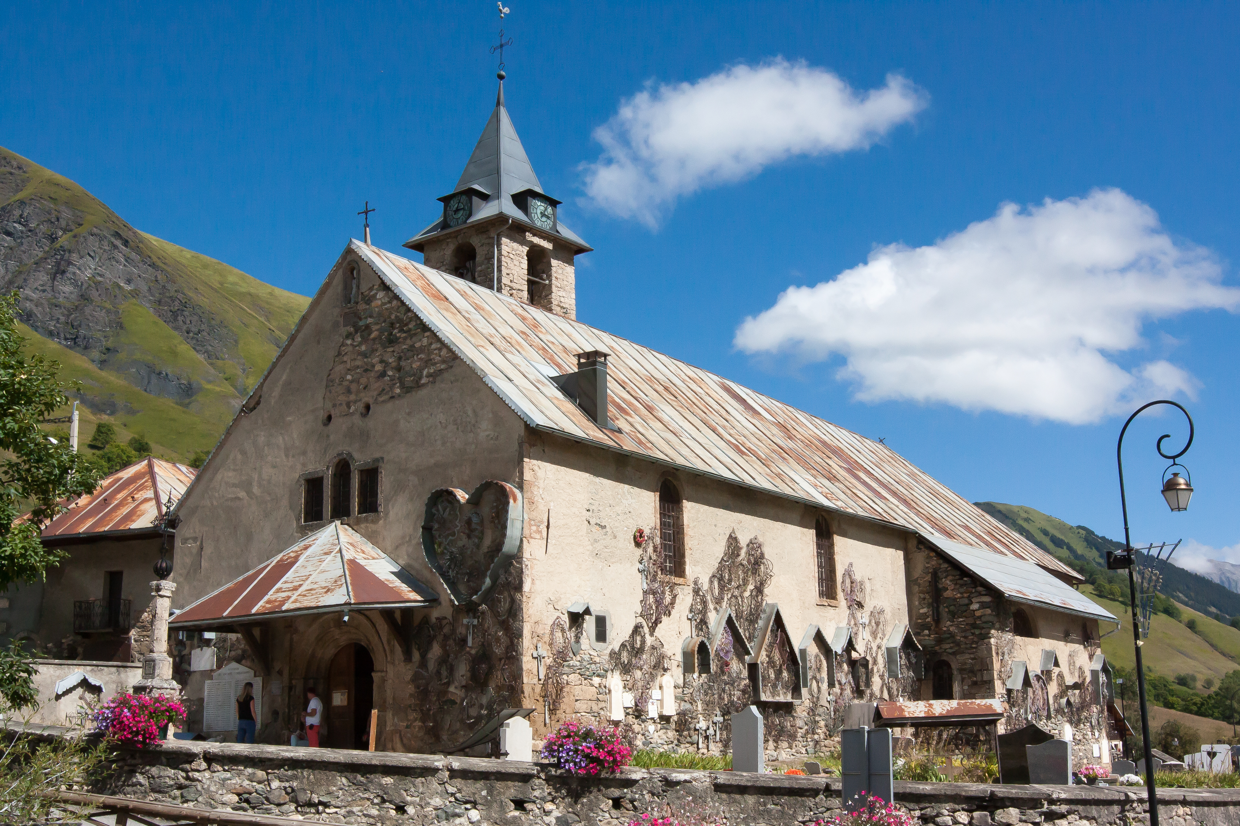 Exterieur de l'église Saint-Saturnin de Saint-Sorlin-d'Arves / Saint-Sorlin-d'Arves / Savoie / France